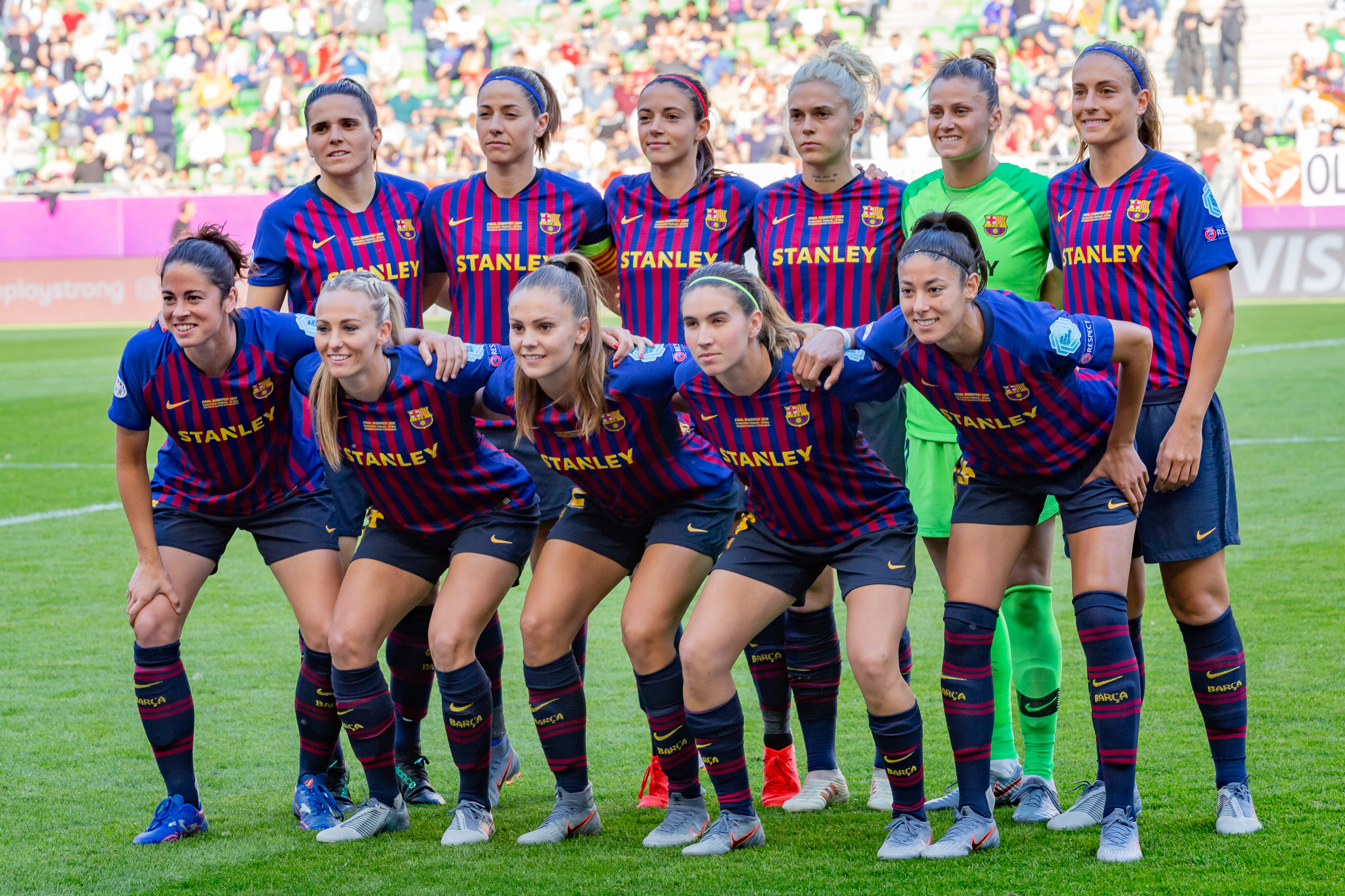 Fußball, Frauen, UEFA Women's Champions League, Olympique Lyonnais - FC Barcelona; Mannschaftsfoto, Aufstellung, team photo FC Barcelona